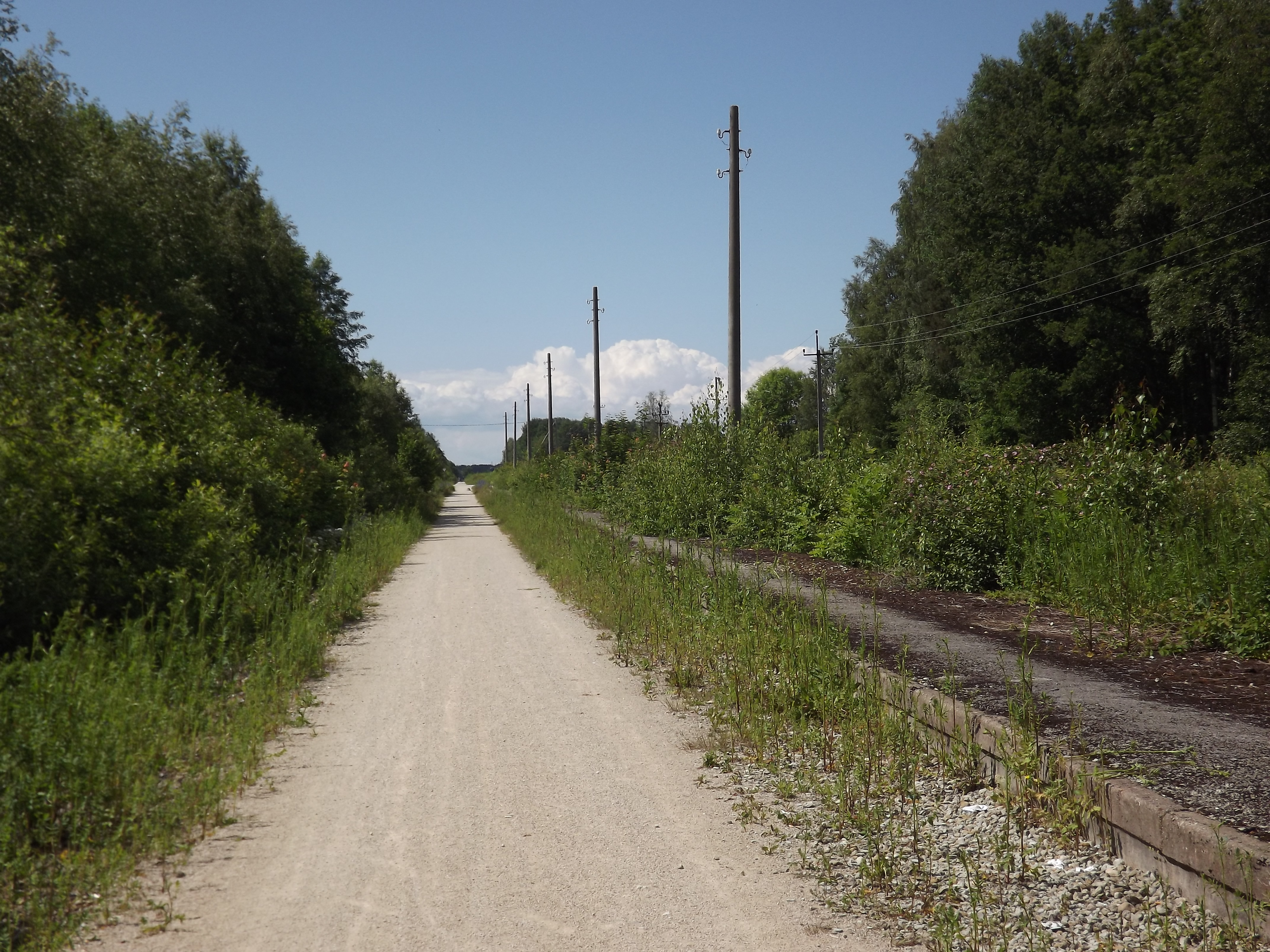 Endine Uuemõisa raudteepeatus.